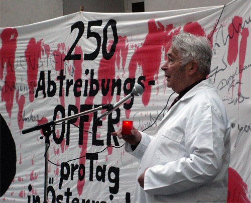 Pornojäger Martin Humer bei einer Lebensschutzaktion in Wien.